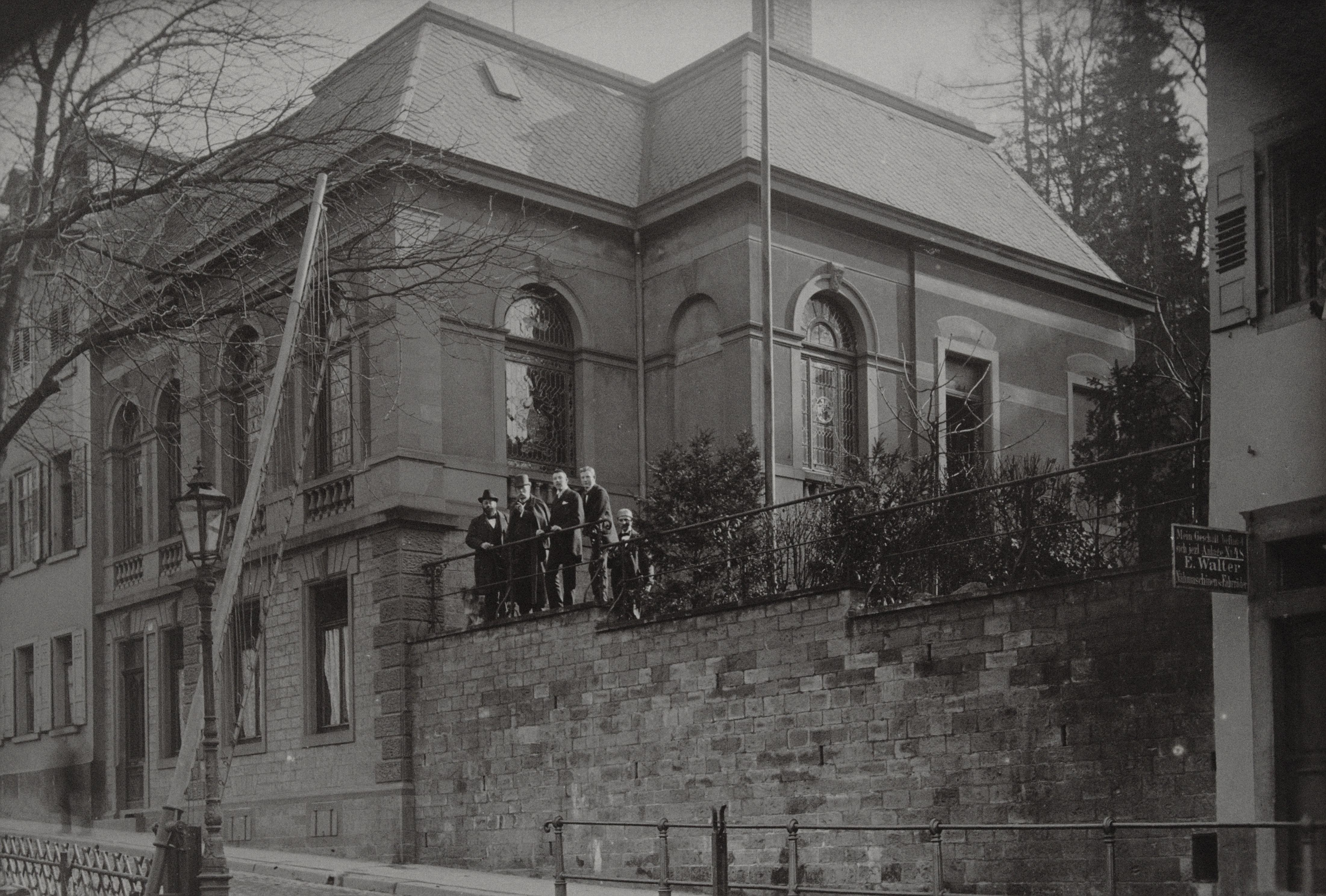 Foto des Verbindungshauses der Leonensia in Heidelberg